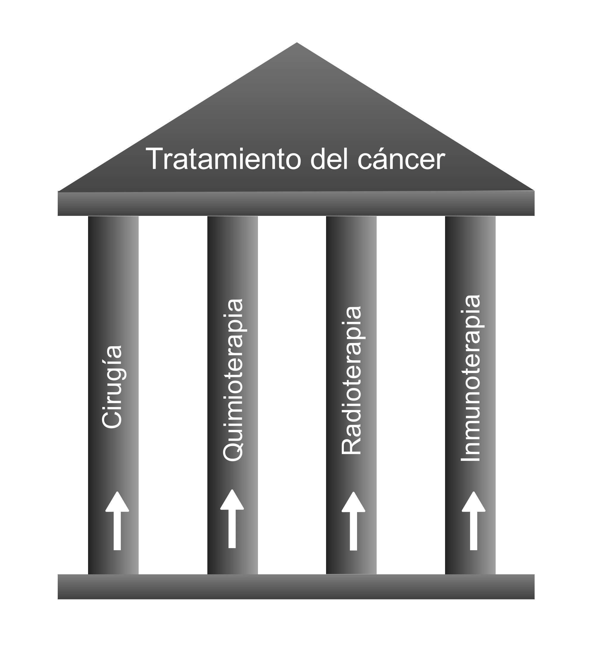 Esquema en el que se muestra los principales tipos de tratamiento que se emplean contra el cáncer.